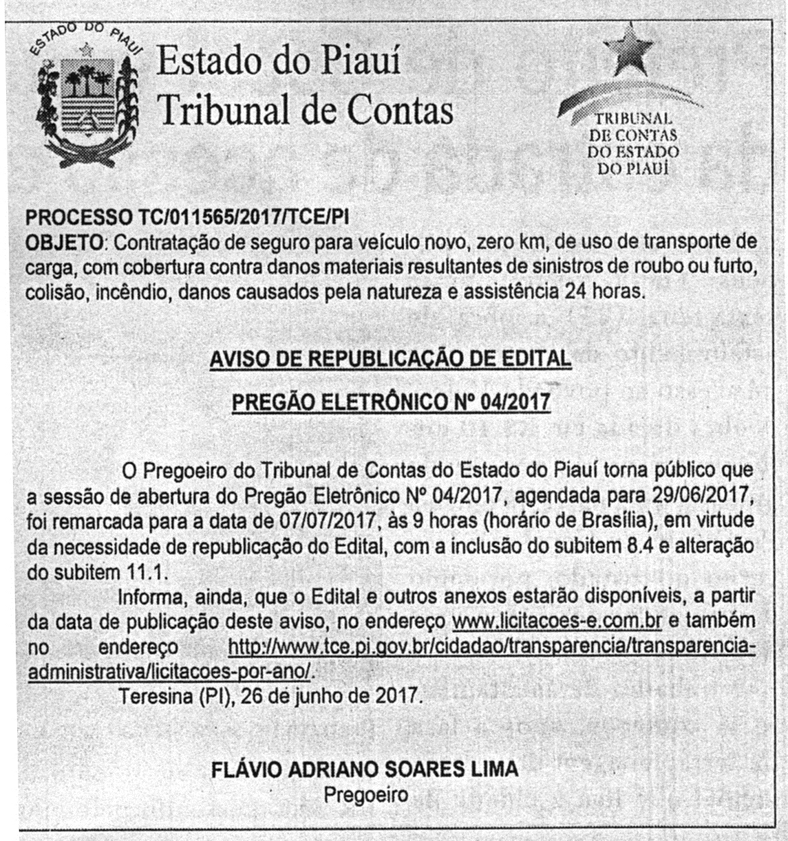 Documento de publicidade de licitação no Tribunal de Contas do Estado do Piauí, na modalidade de pregão eletrônico.